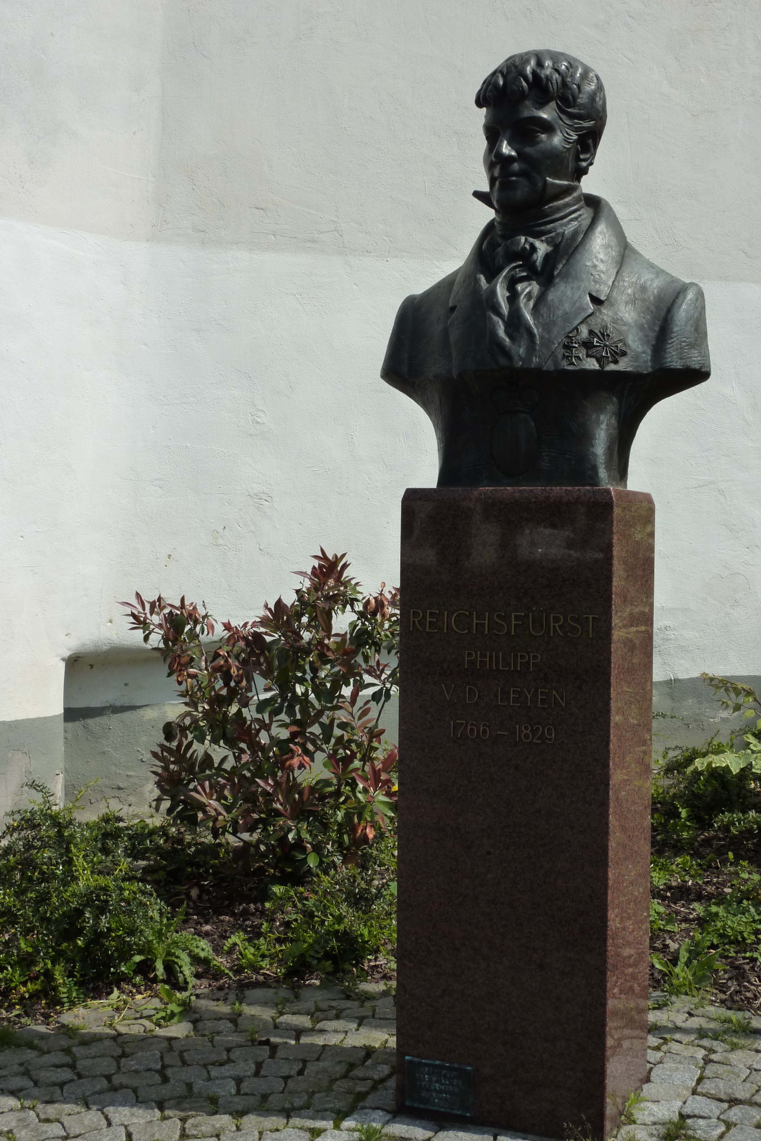 Büste von Philipp von der Leyen vor dem Schloss Gondorf